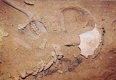 excavado (Ausgrabungsstelle)